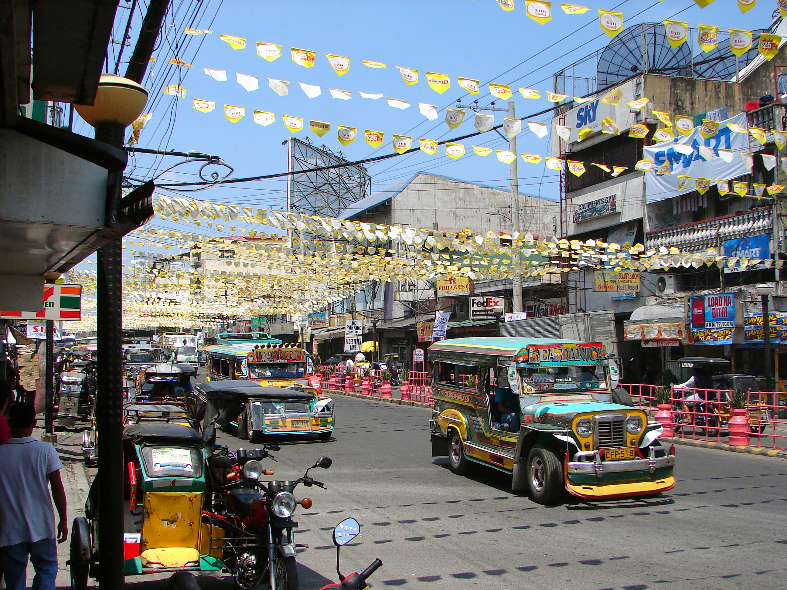 Dagupan, Pangasinan, Philippines